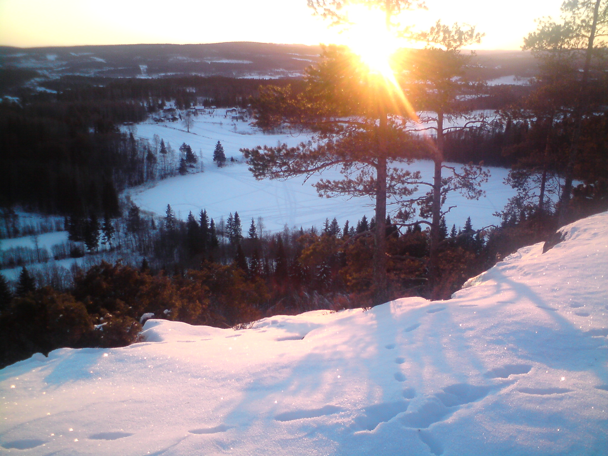 En vinterkväll med sagolik utsikt över Hulitjärnen i Sundsvall.